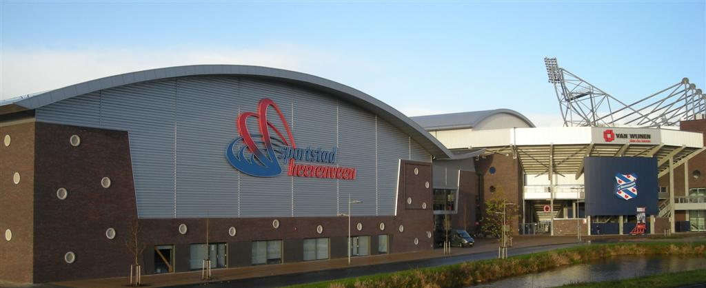 Multifunctioneel centrum Sportstad Heerenveen